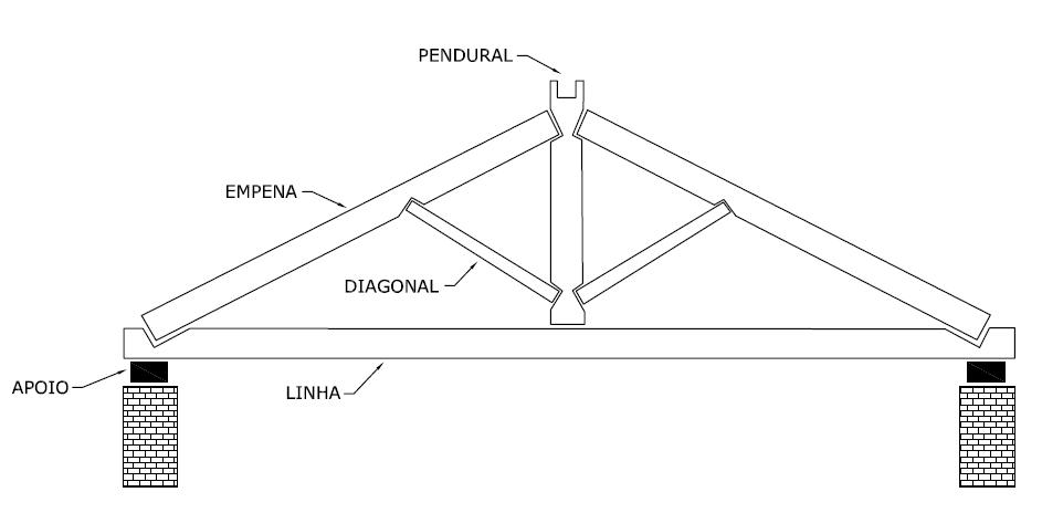 Esquemático de uma estrutura para construção de telhado denominada tesoura.